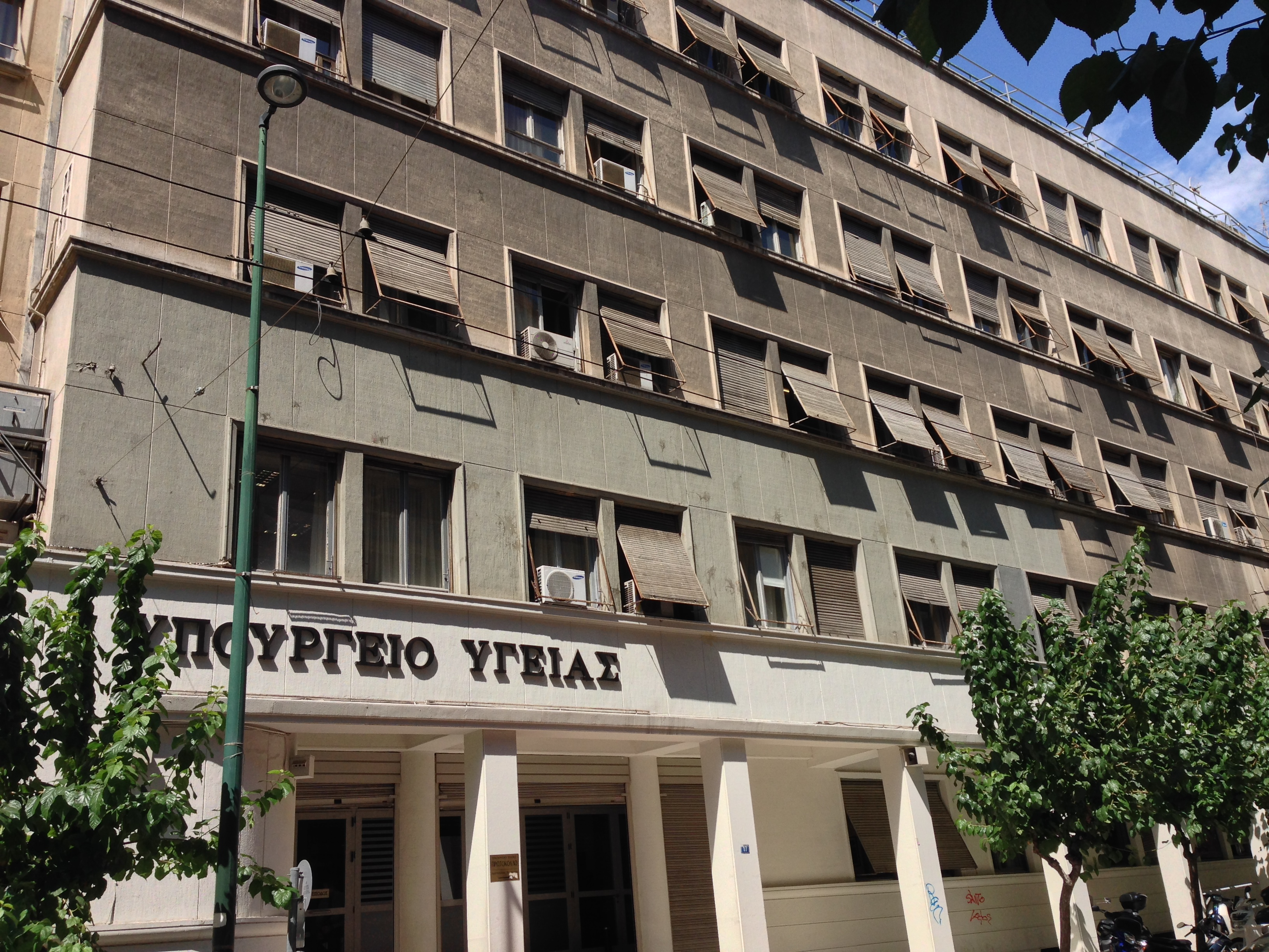 Ministry of Health - Υπουργείο Υγείας